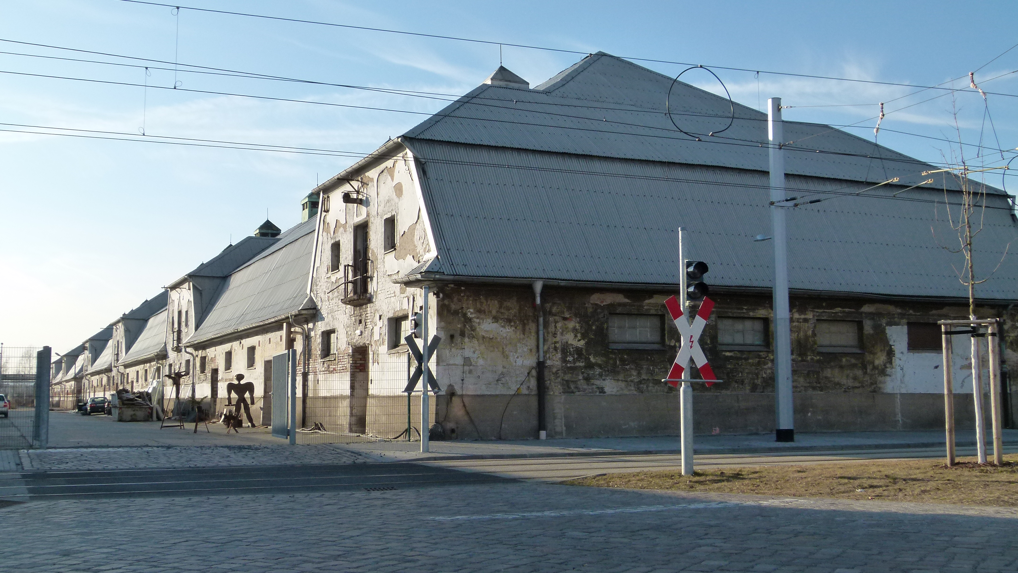 Denkmalgeschütztes Gebäude auf dem heutigen Messegelände, ehemaliger Futterstall, Zur Messe 9, Friedrichstadt, Dresden